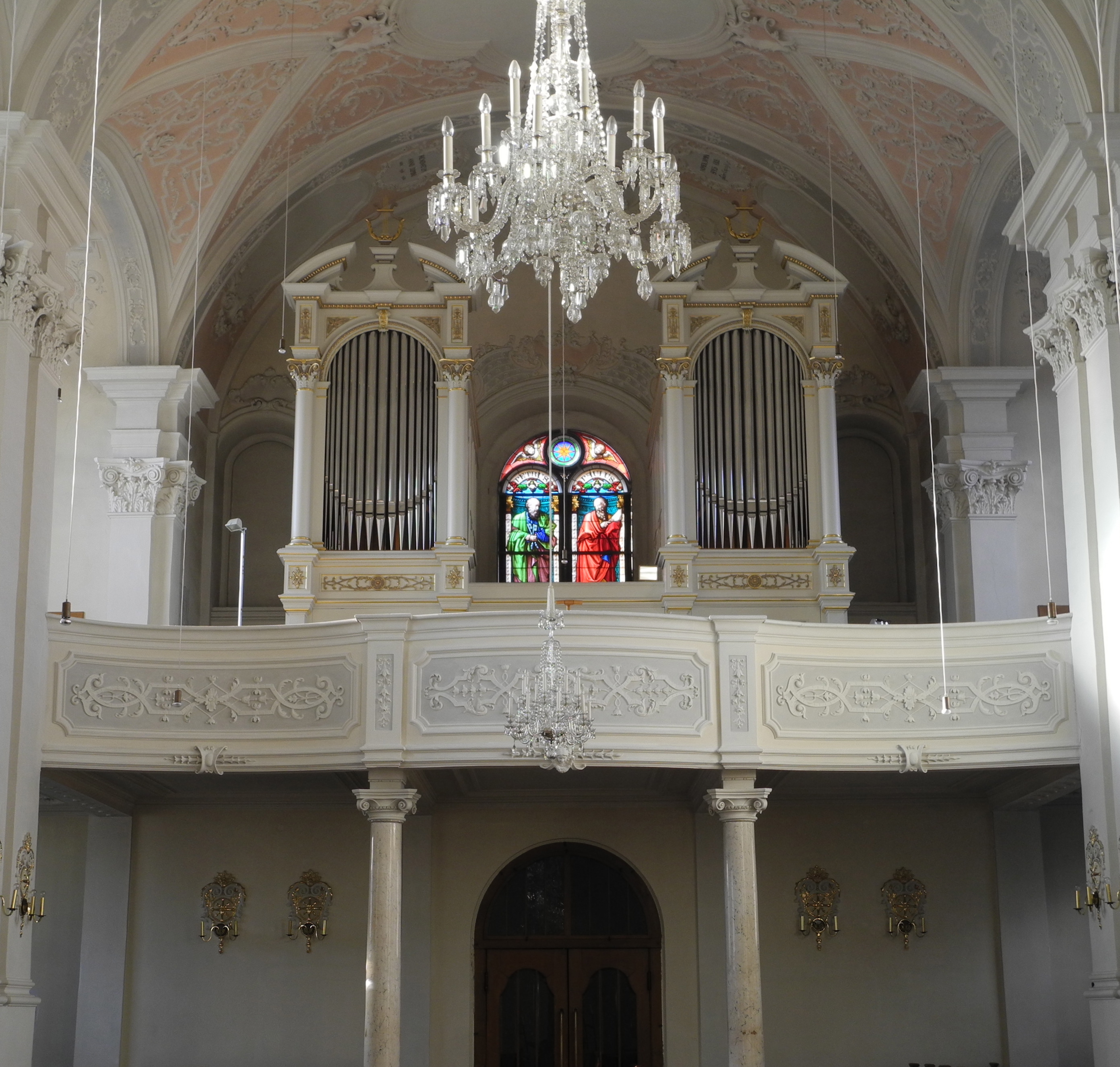 Paulanerkirche: Im exemplarischen Neo-Renaissancepropekt von Steinmeyer (1889) tönt seit 1988 eine Hey (41/III/P)